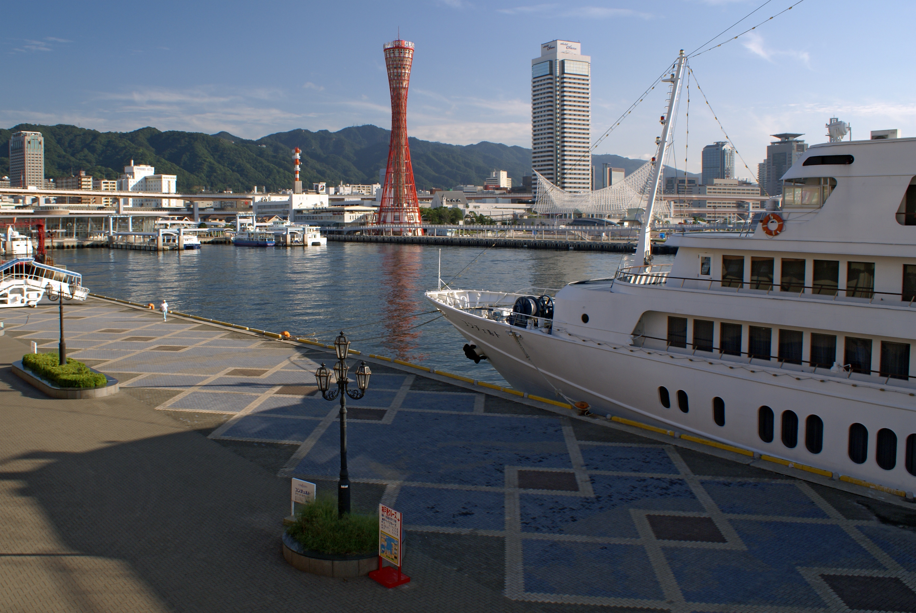 Harborland "Takahama-ganpeki" of the Kobe harbor ( Kobe, Hyogo, Japan)